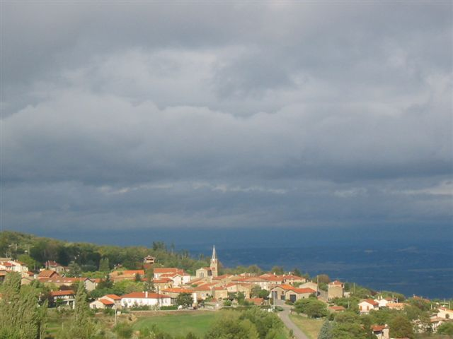 Veranne